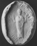 Róbert veszprémi püspök pecsétje 1210-ből